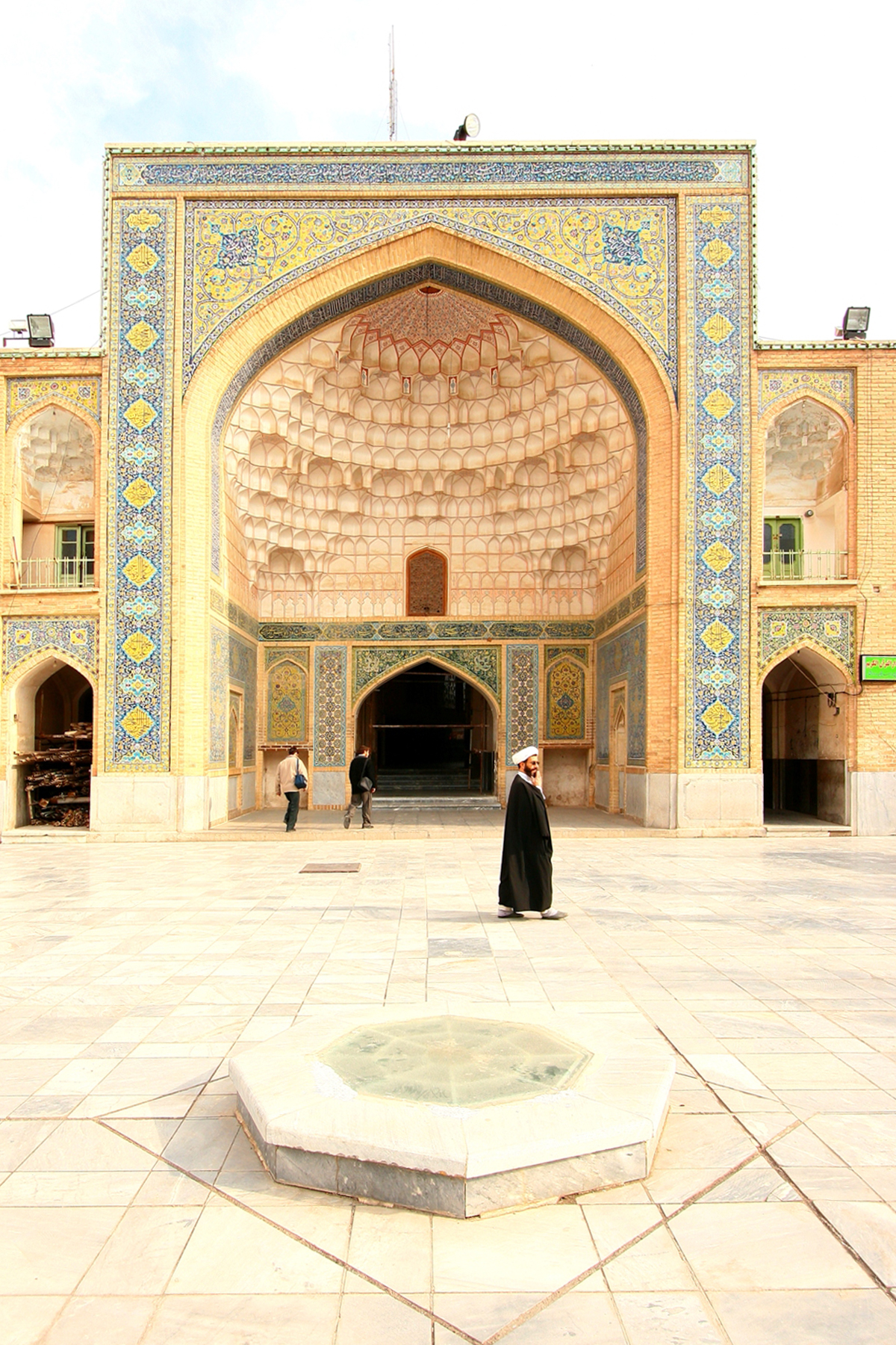 مدرسه فیضیه